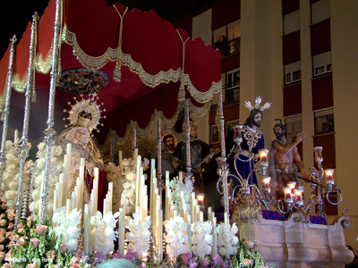 Salida Procesional Martes Santo